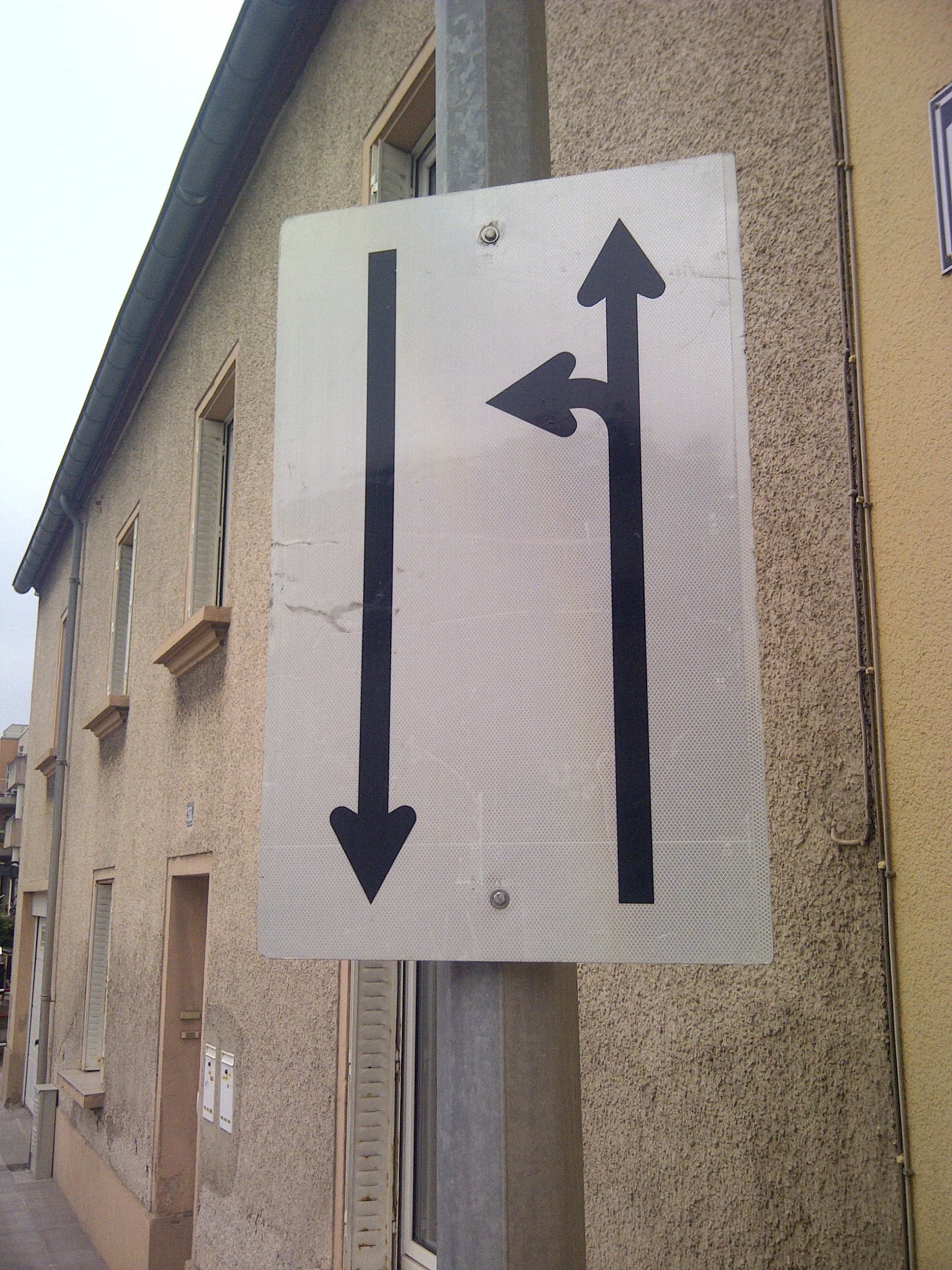 Verkéiersschëld G,4b "Signal comportant une indication (chantier)" aus dem lëtzebuerger Code de la Route.